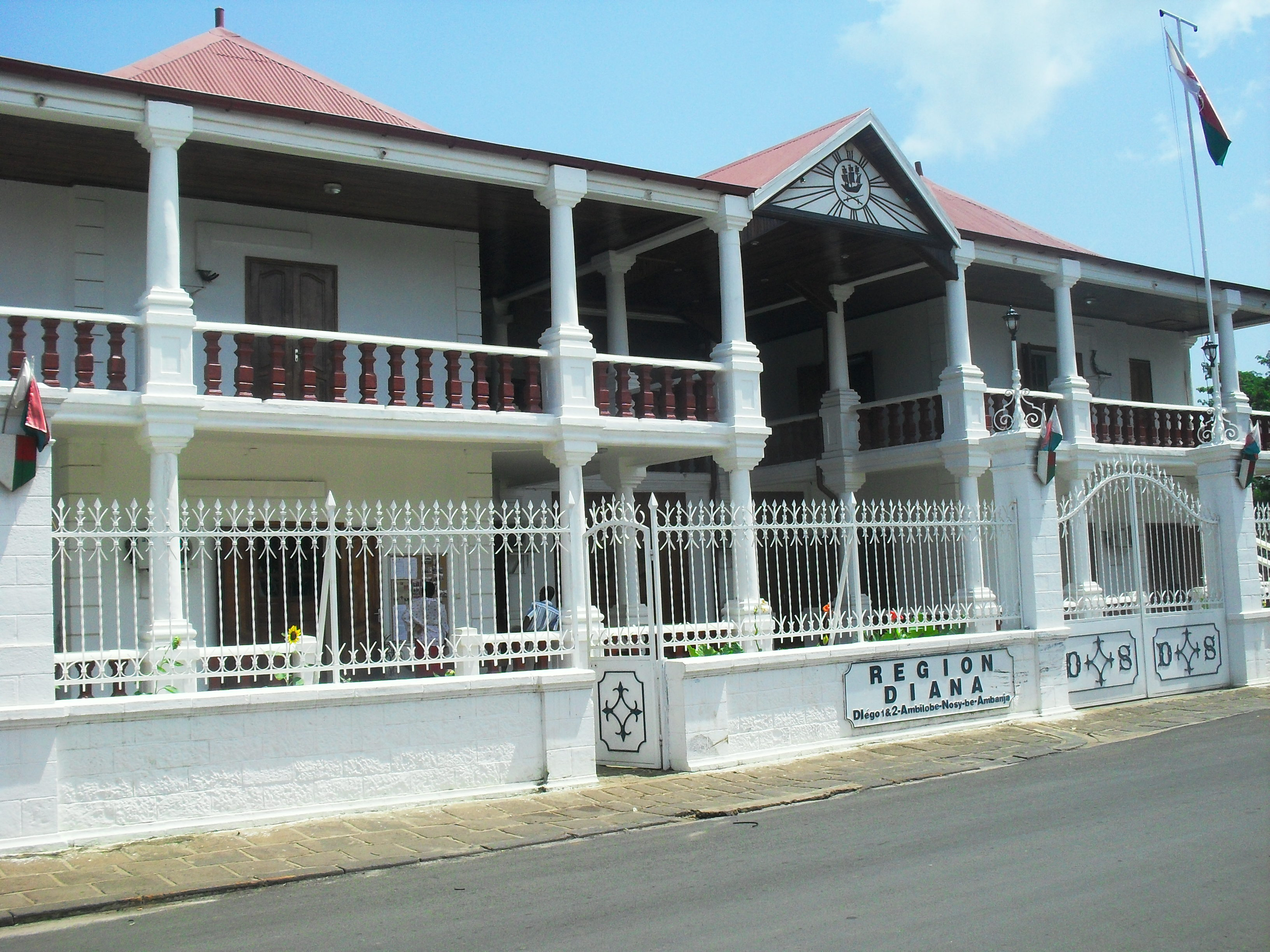 Bureau de la Région Diana